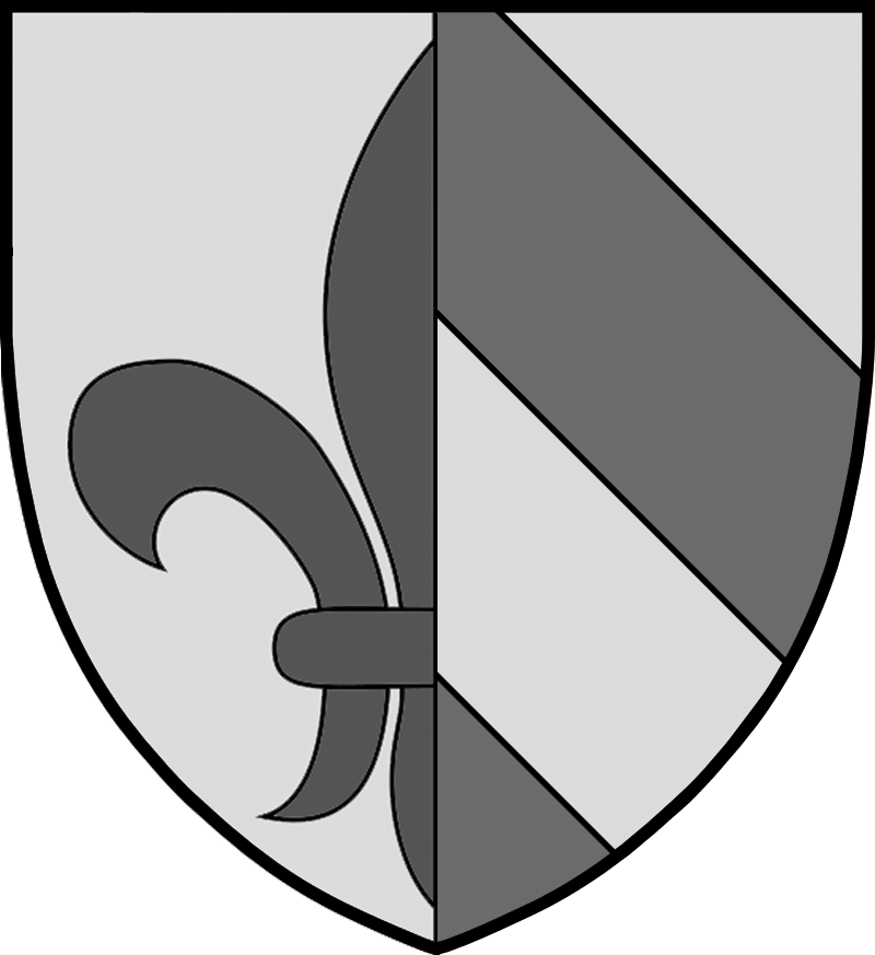 Vapensköld för svenska marsken Håkan Tunesson (Håkan Tunessons ätt och Vintorpaätten)